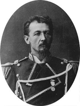 Lorenzo Vintter, general del ejército argentino que participó en la campaña del desierto de 1878.